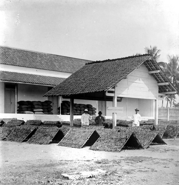 Repronegatief. Tabak uit bevolkingsaanplant op droogrekken, Java Sumatra Handels Mij te Bodjonegoro